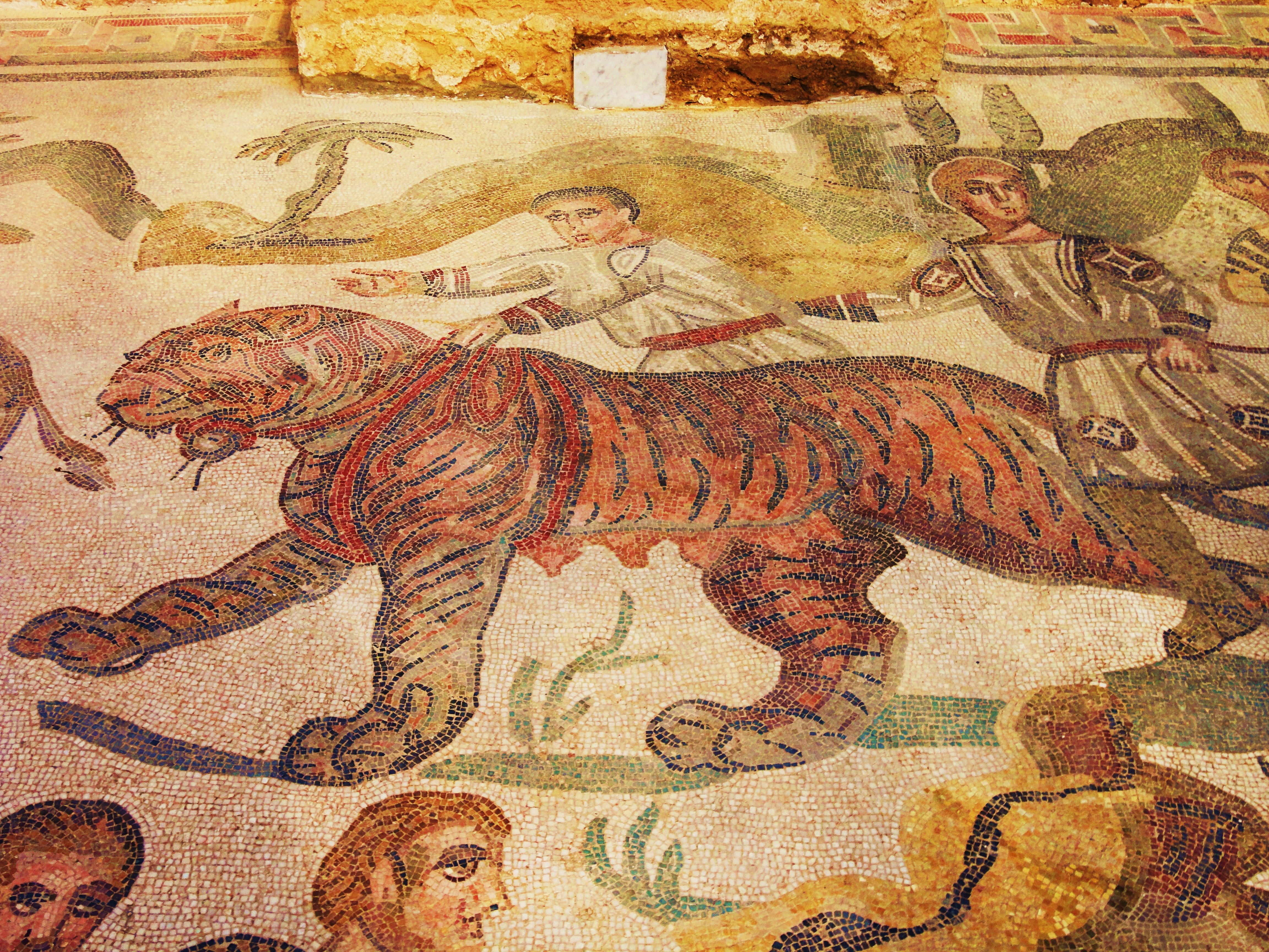 Villa romana di Piazza Armerina - Sicilia - tigre